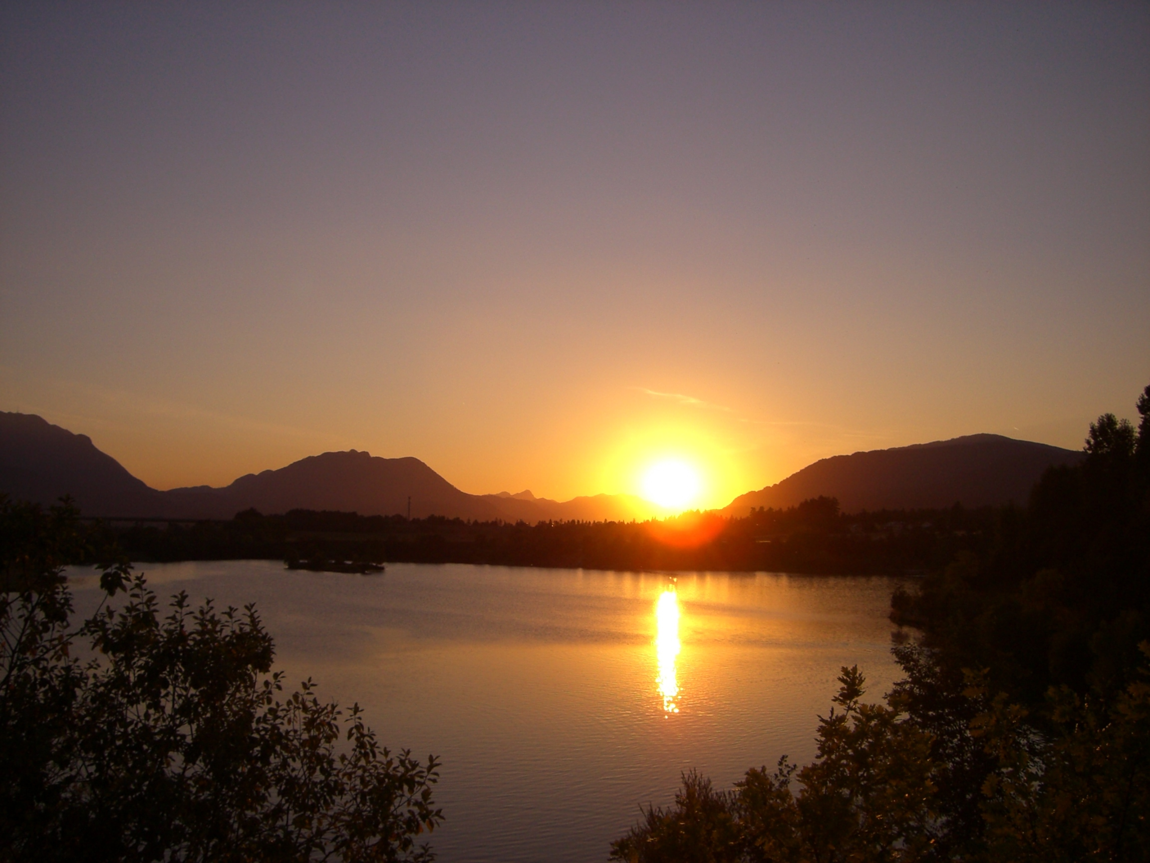 Sunset at lake Silbersee